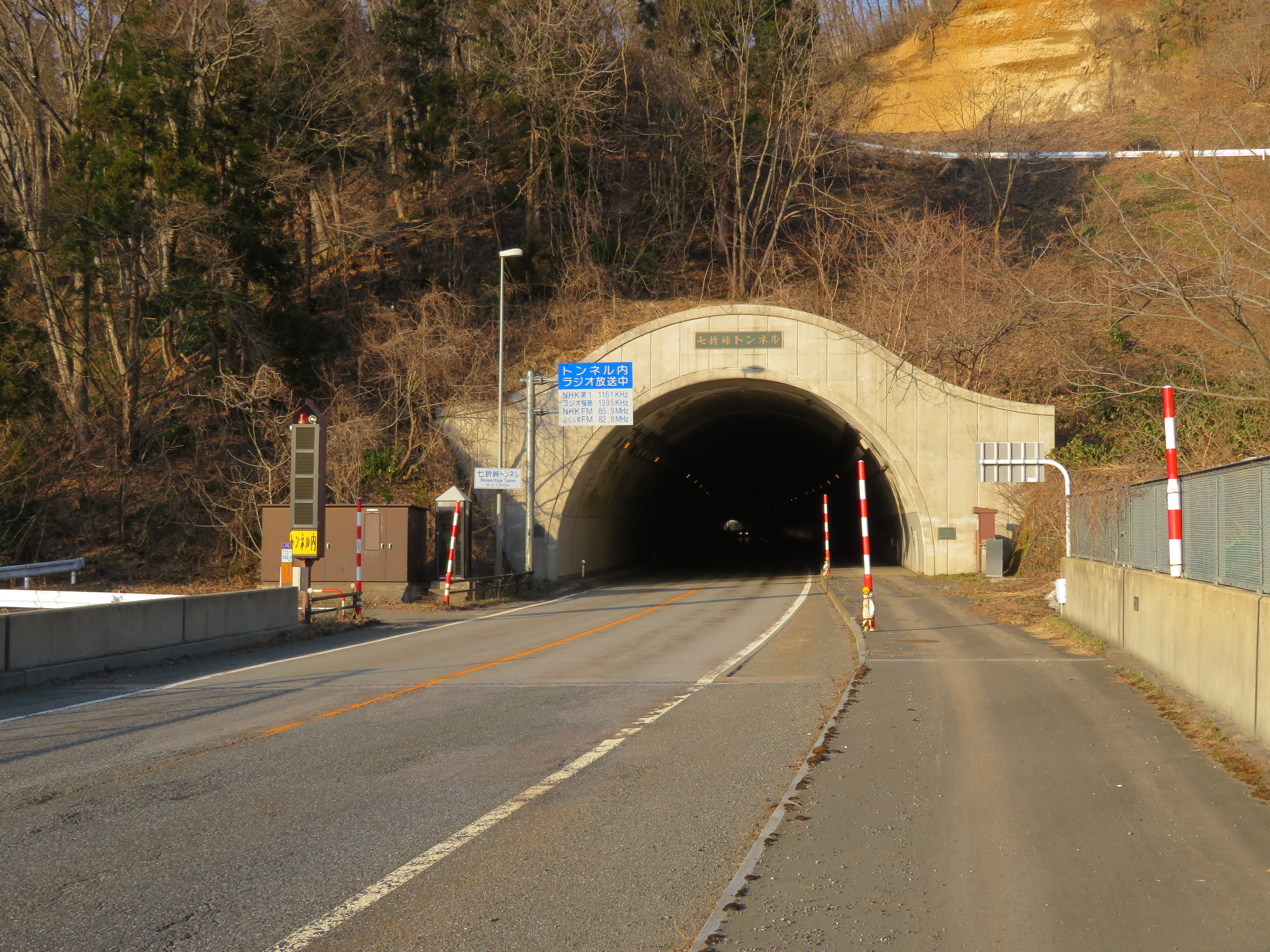 国道49号線七折峠トンネル（新潟側坑口付近）